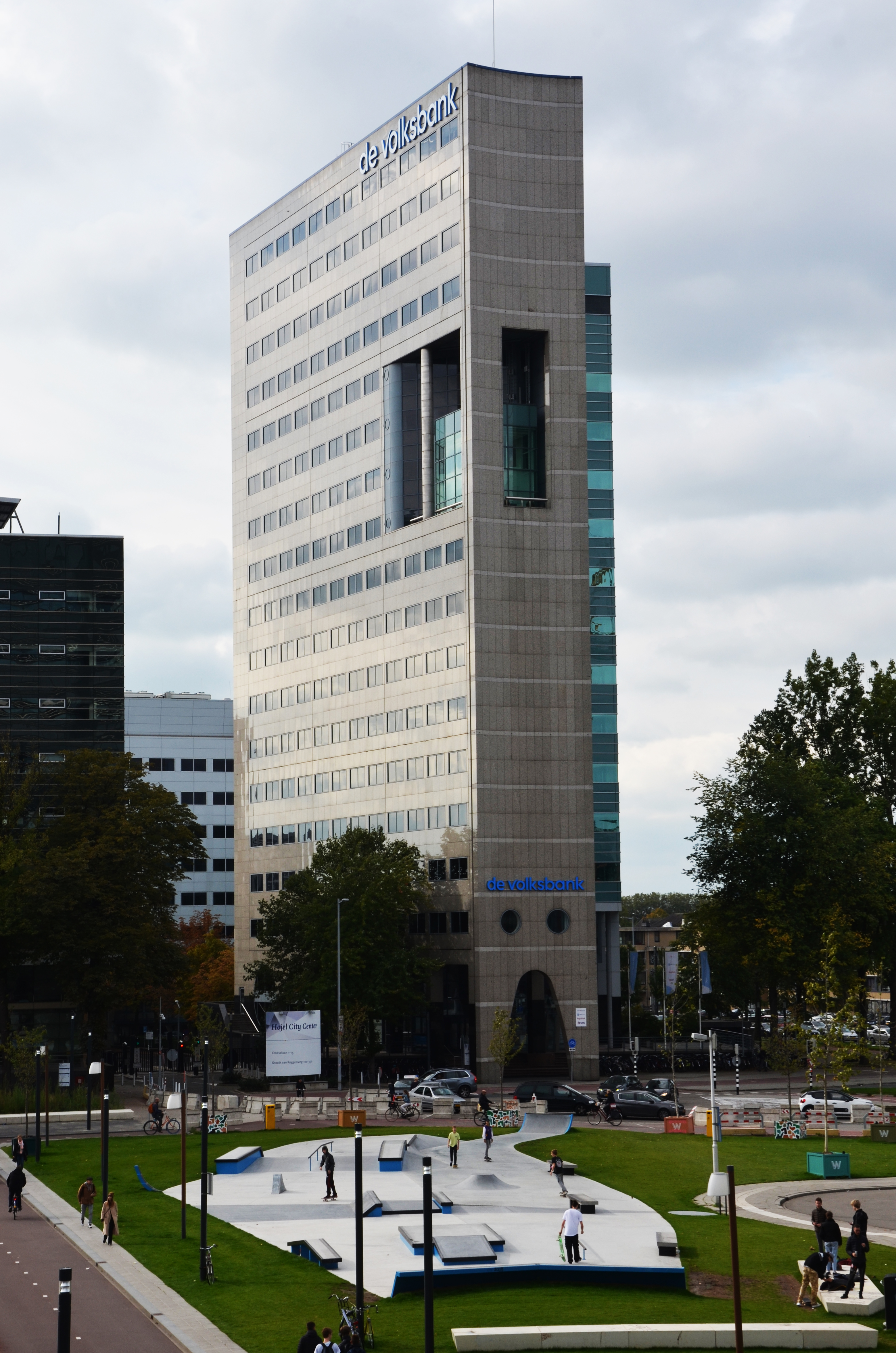 Het kantoor van de Volksbank in Utrecht.